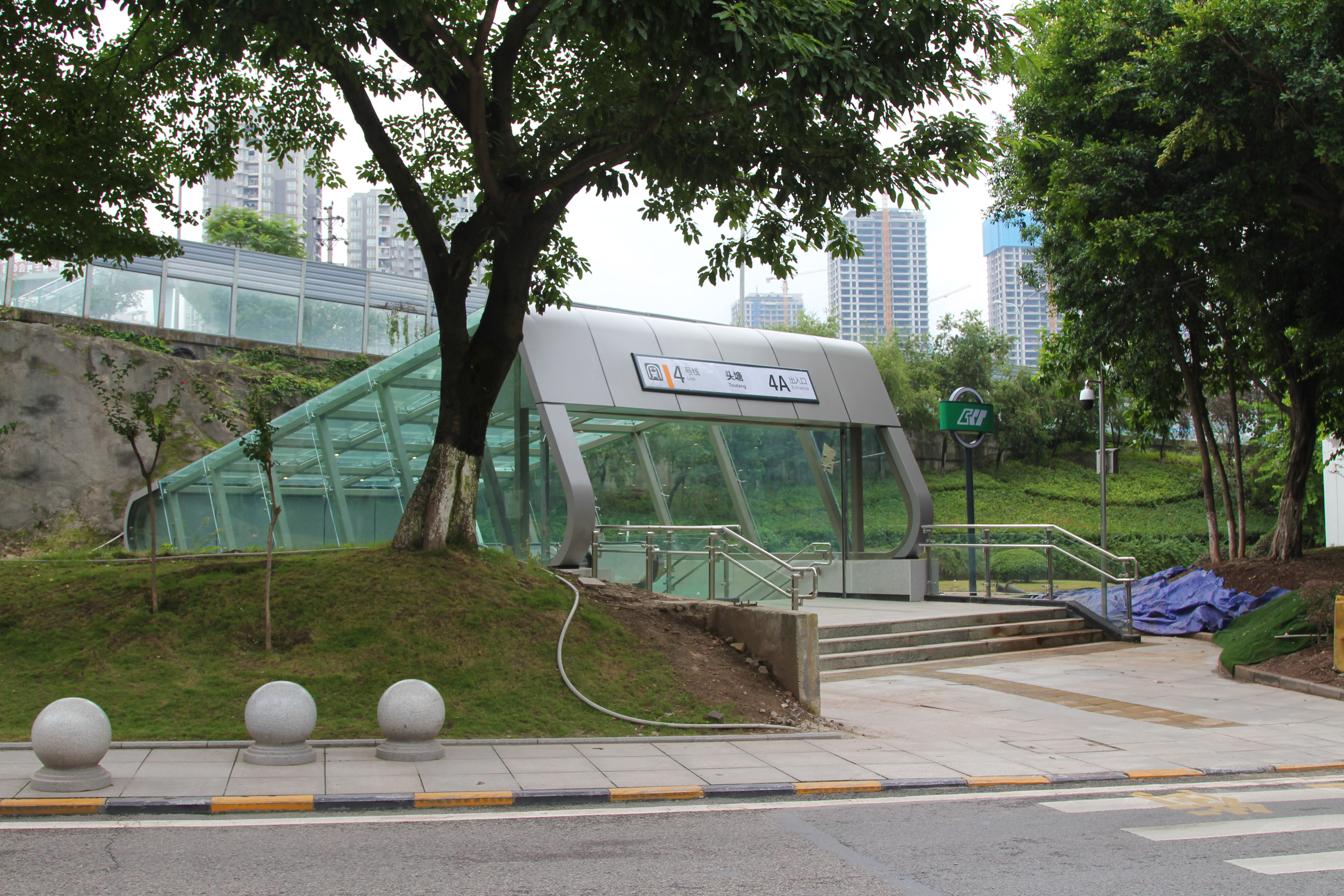 4号线头塘站4A出口